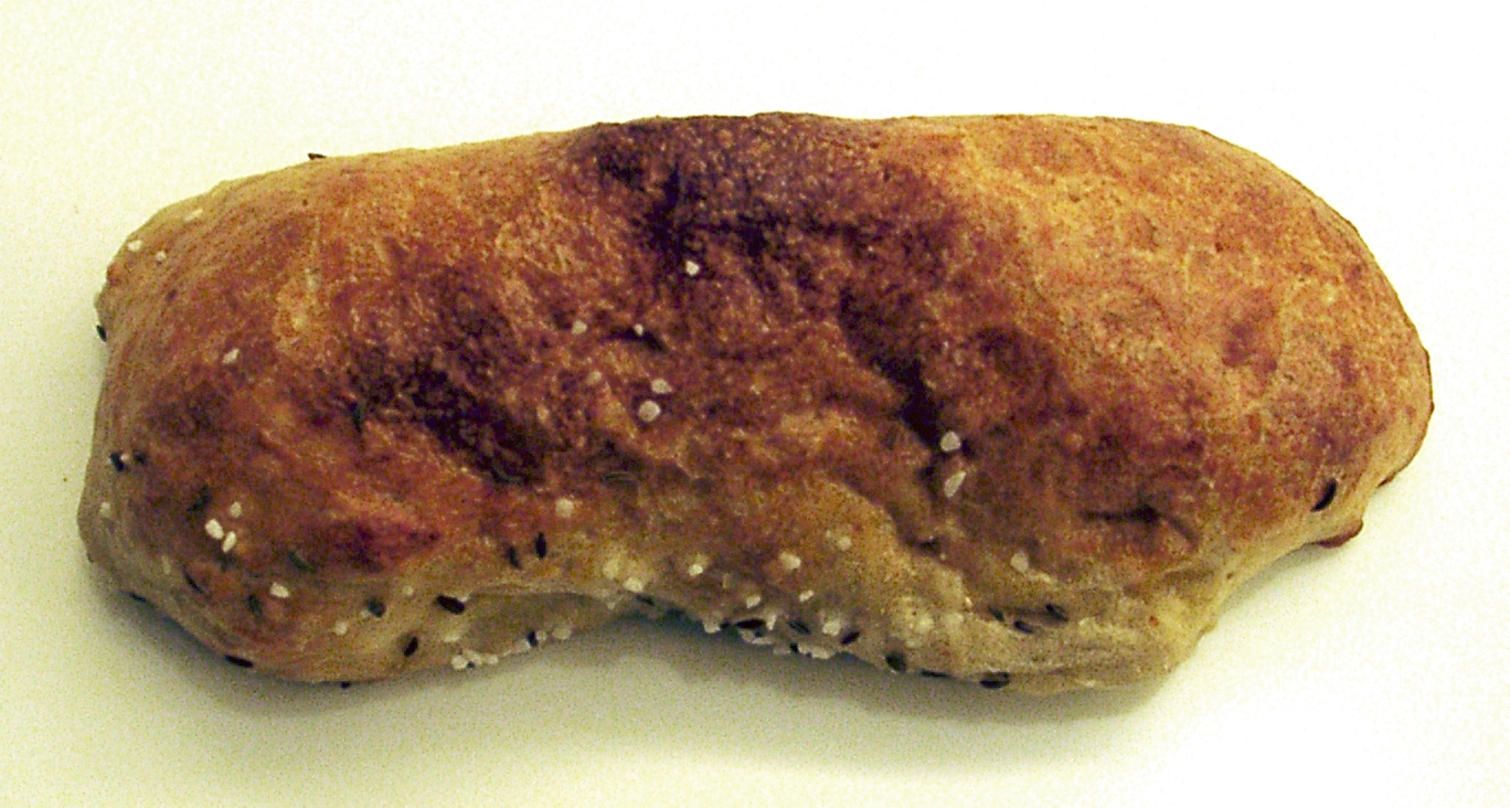 Schwäbisch Gmünd, Gebäck "Briegel"